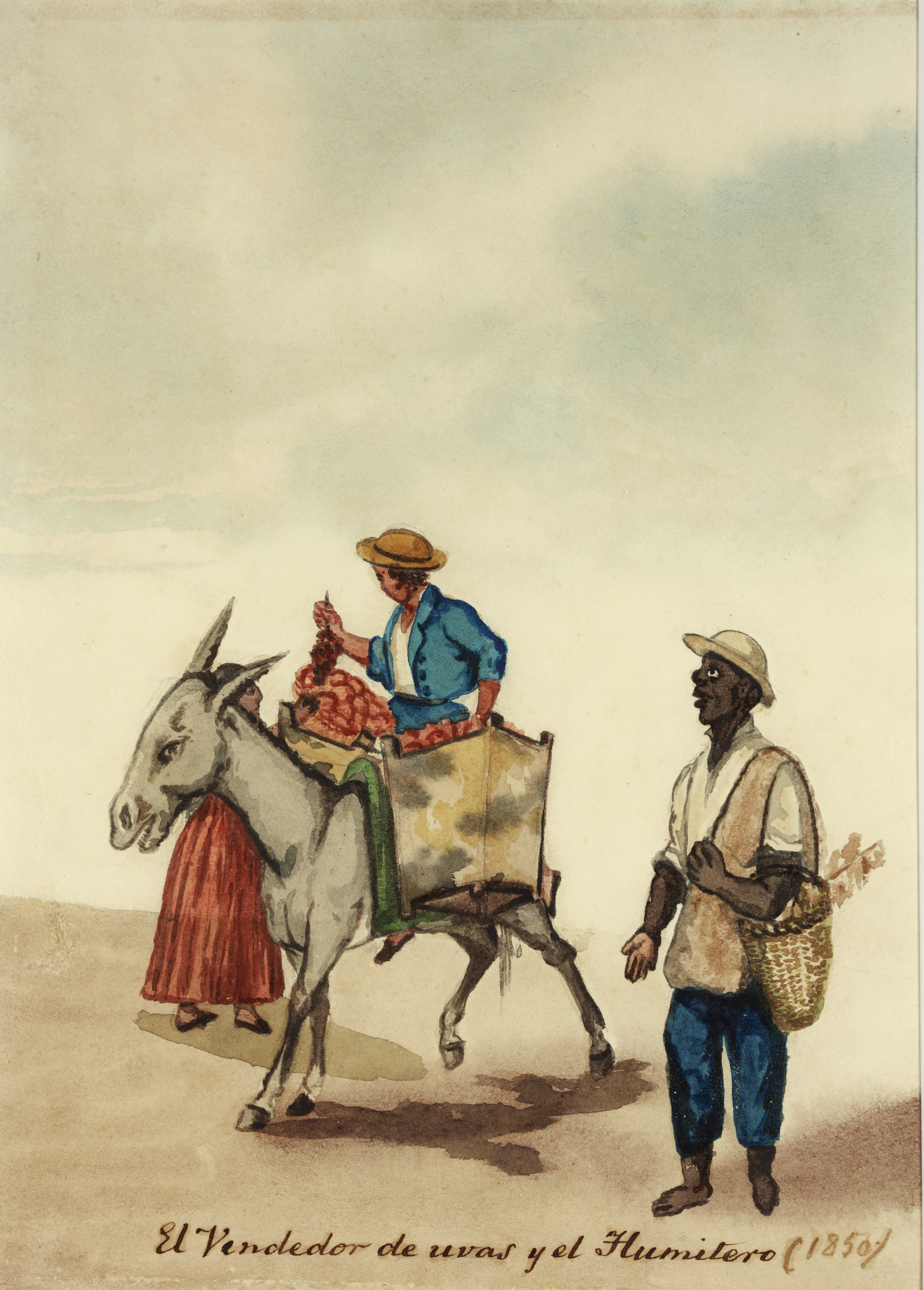 Acuarela de Pancho Fierro (Lima, 1807 - Lima, 1879)